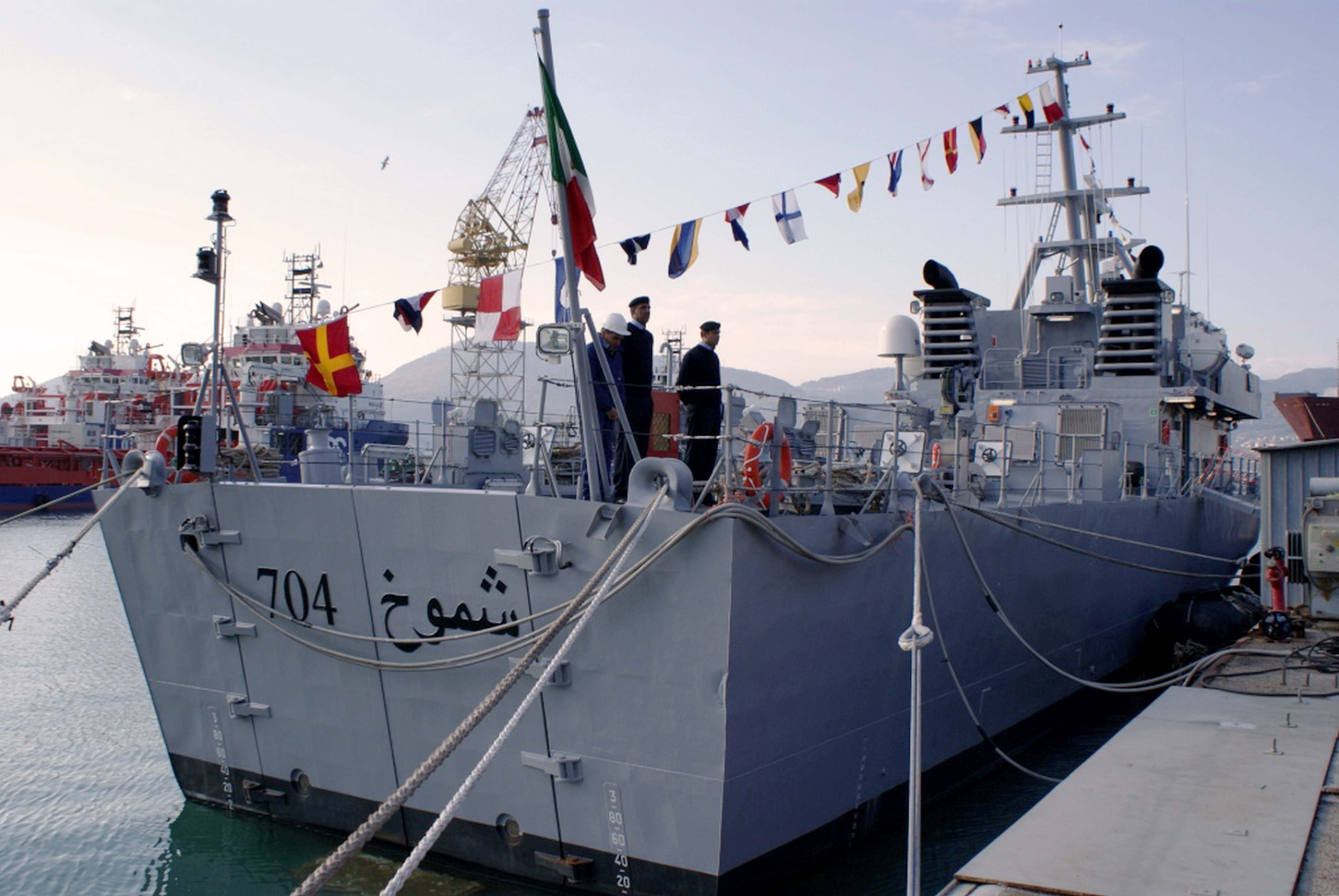 Pattugliatori iracheni del tipo Saettia MK IV in prossimità della consegna a La spezia